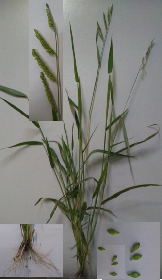 Шерстяк волосистый. Eriochloa villosa (Thubg) Knuth